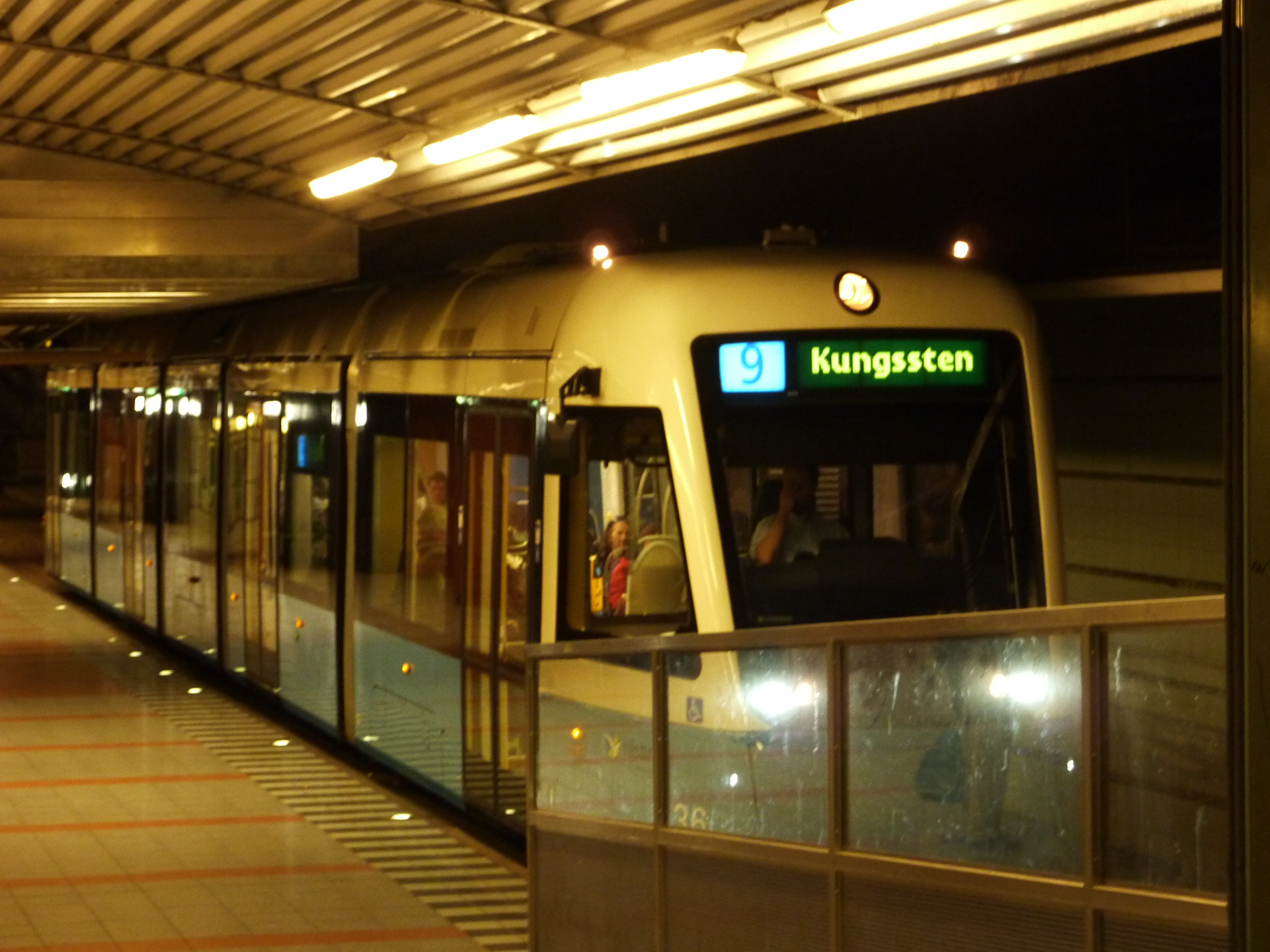 Sirio Spårvagn linje 9 Hammarkullen